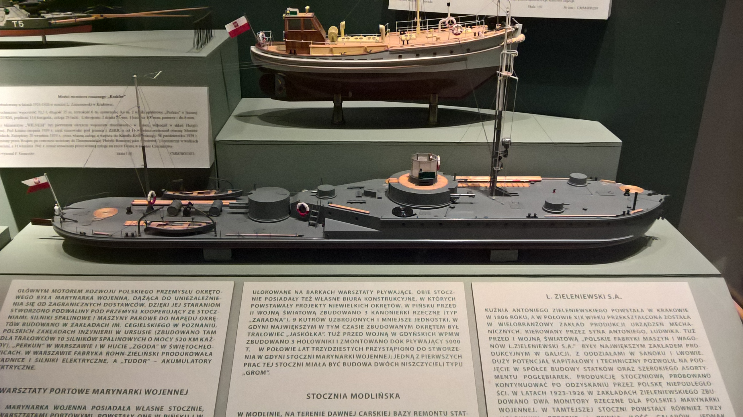 Model polskiego monitora ORP "Kraków", eksponowany w Narodowym Muzeum Morskim w Gdańsku.